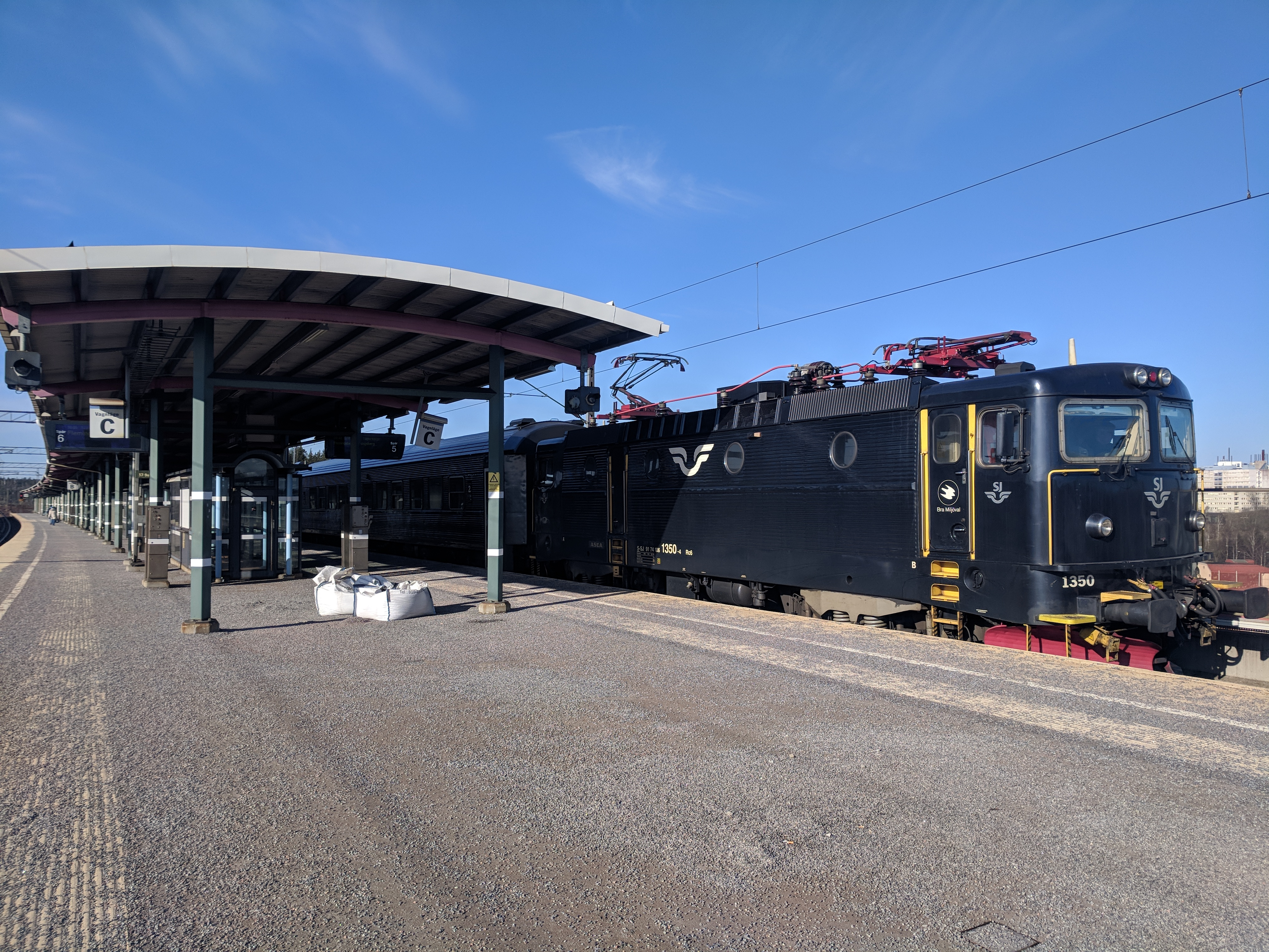 Södertälje Syd